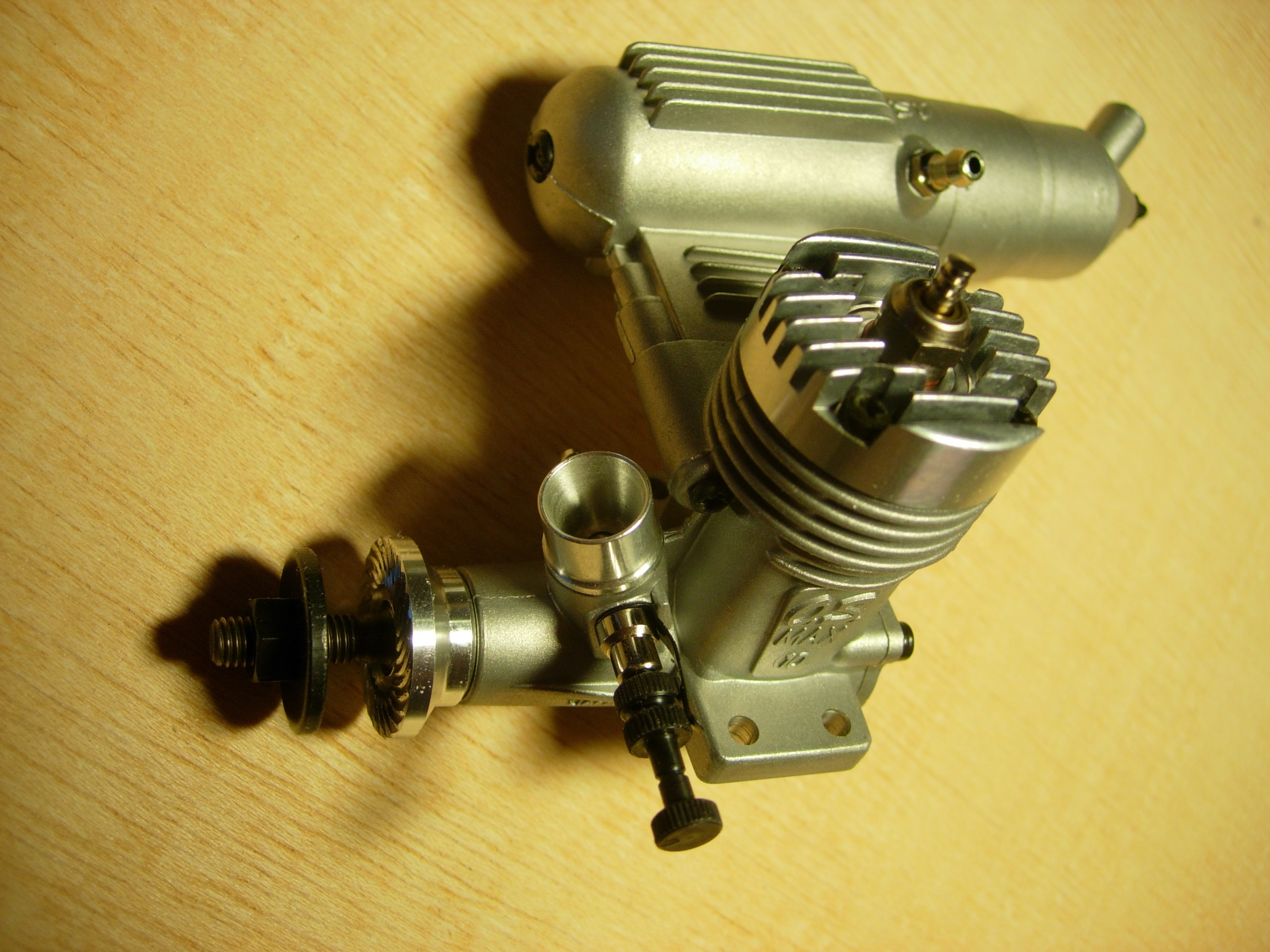 Polttomoottori: O.S. 10 FP-S